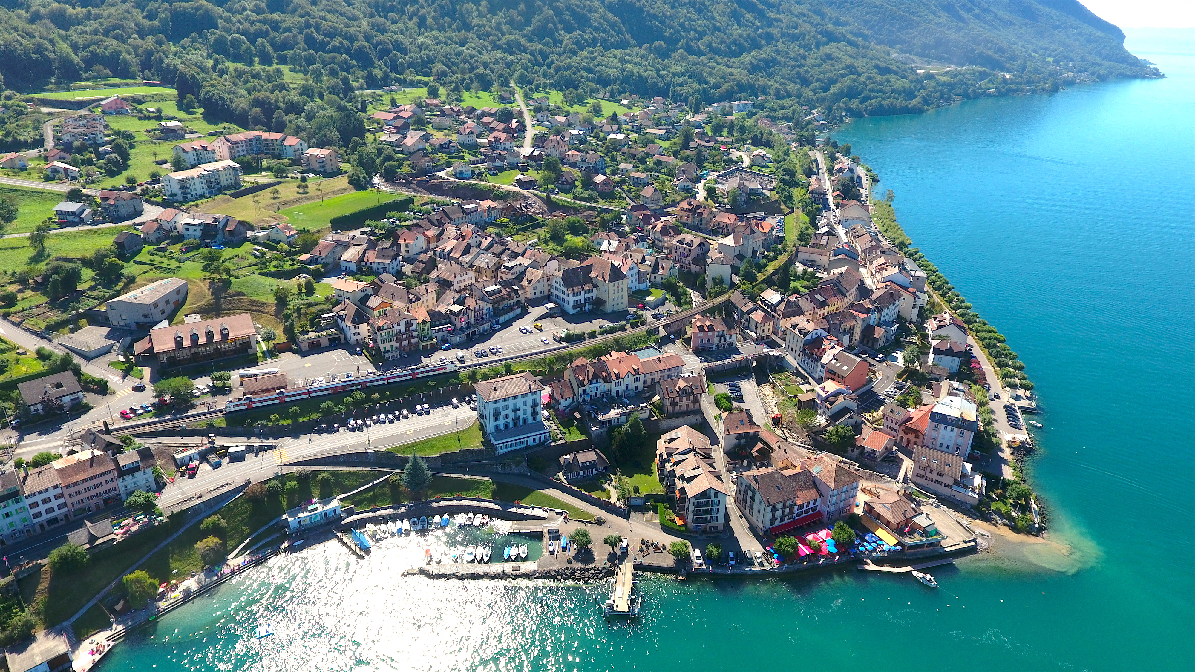 Photo aérienne de saint-Gingolph, prise le 24 août 2016 à l'aide d'un drône.